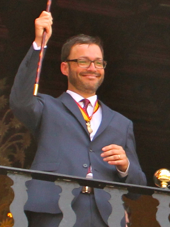 José Hila investit batle de Palma